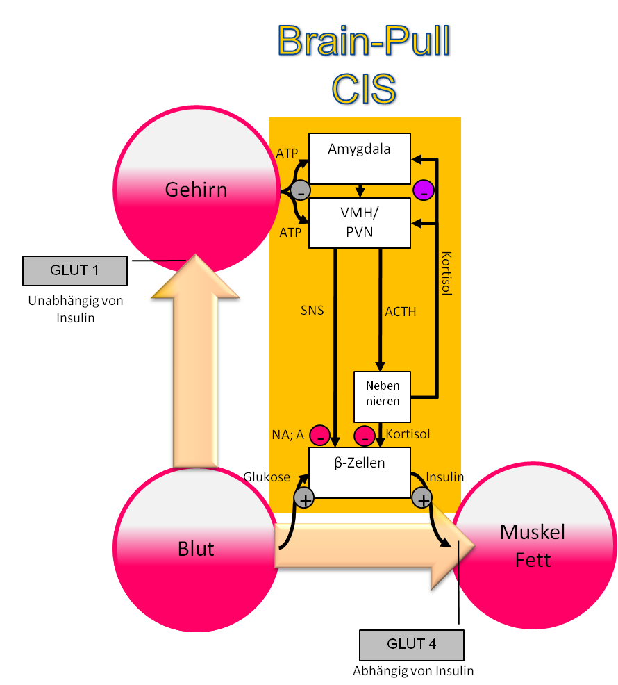 Schematische Darstellung der Cerebralen Insulin Suppression (CIS)